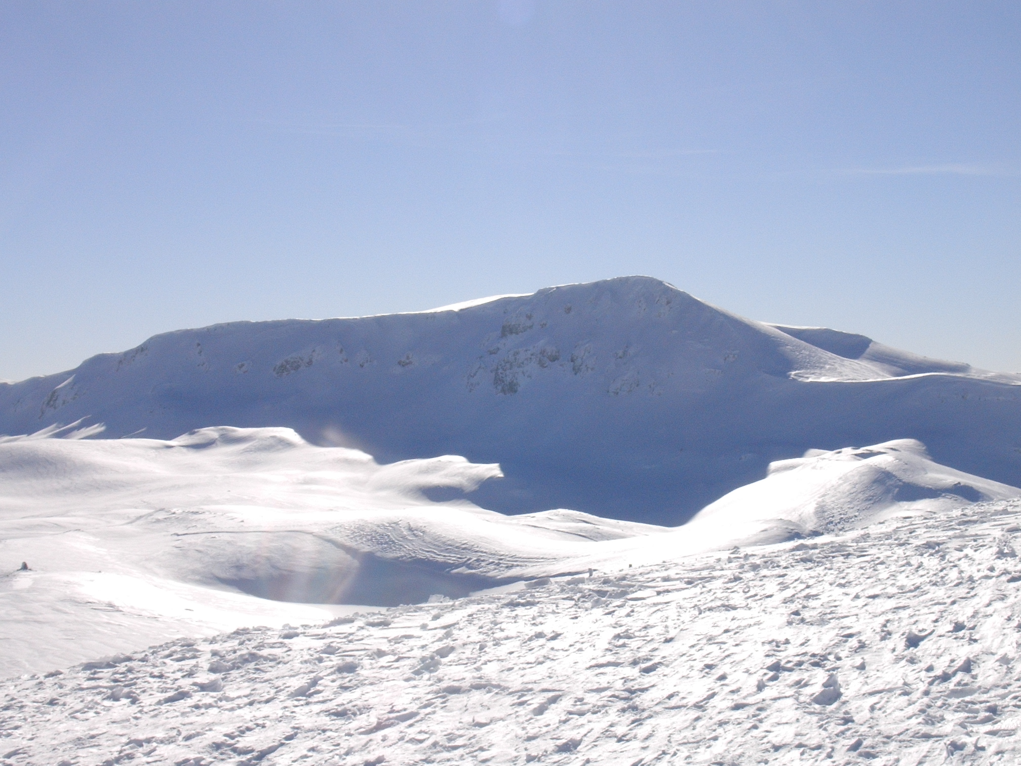 Monte Greco dagli impianti sciistici di Roccaraso - Foto personale Categoria:Montagne dell'Abruzzo